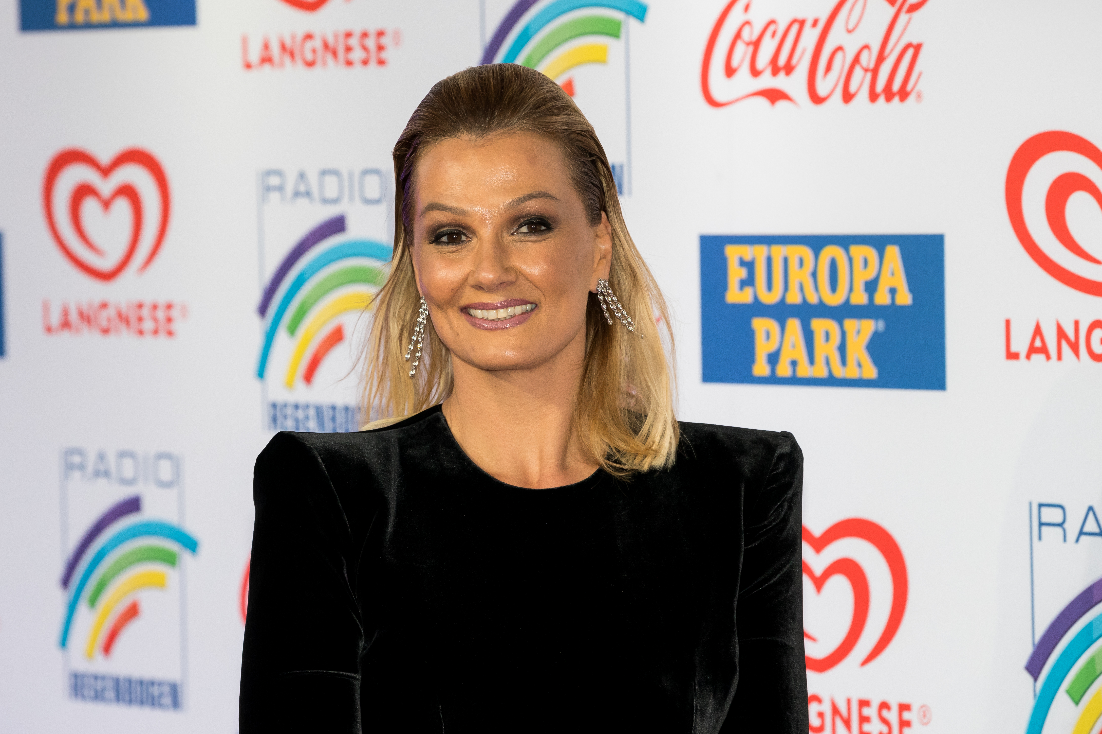 Franziska van Almsick during Radio Regenbogen Award 2019 at Europapark, Rust, Baden-Württemberg, Germany on 2019-04-12, Photo: Sven Mandel